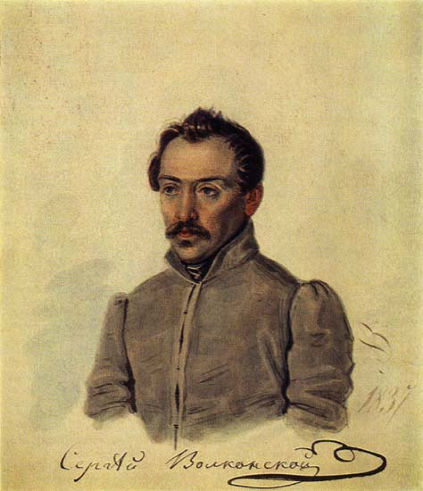 Акварельный портрет декабриста С. Г. Волконского, написанный Н. А. Бестужевым в Сибири в 1837 г.